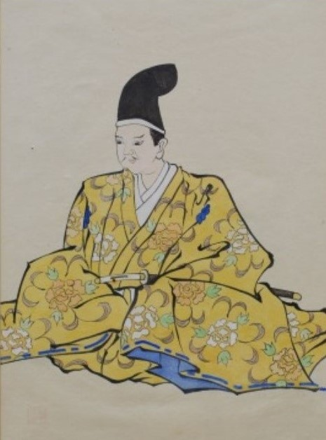 大浦政信の肖像。